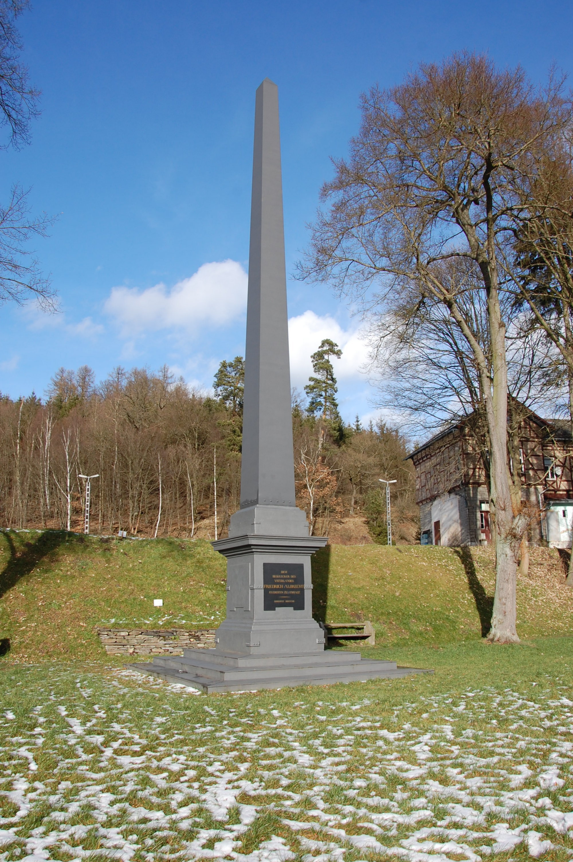 Fürst-Friedrich-Albrecht-Denkmal Mägdesprung